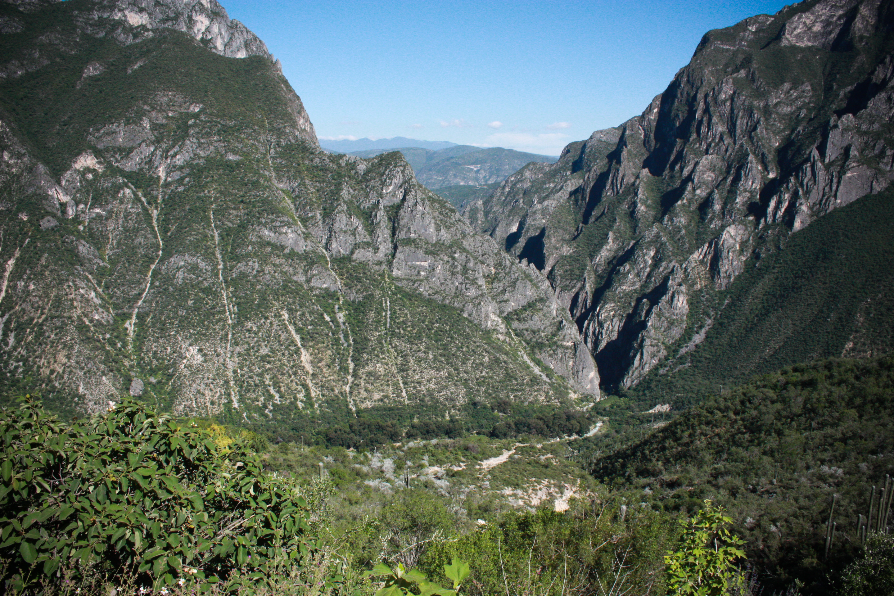 La puerta a la Madre Sierra